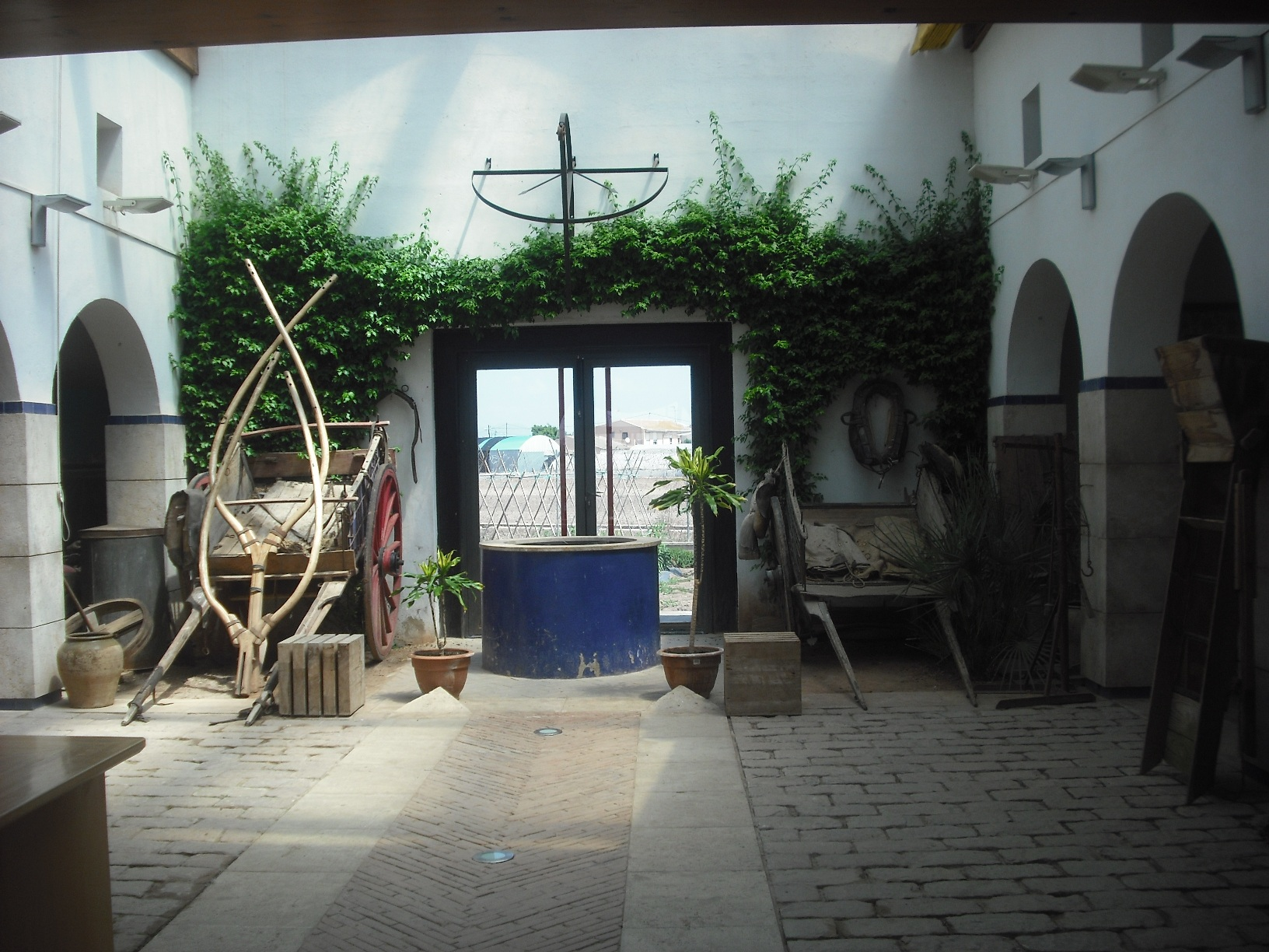 Interior del Museu de l'Horta d'Almàssera.